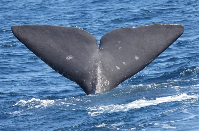 Aleta caudal del cachalote Mediterráneo Amanita